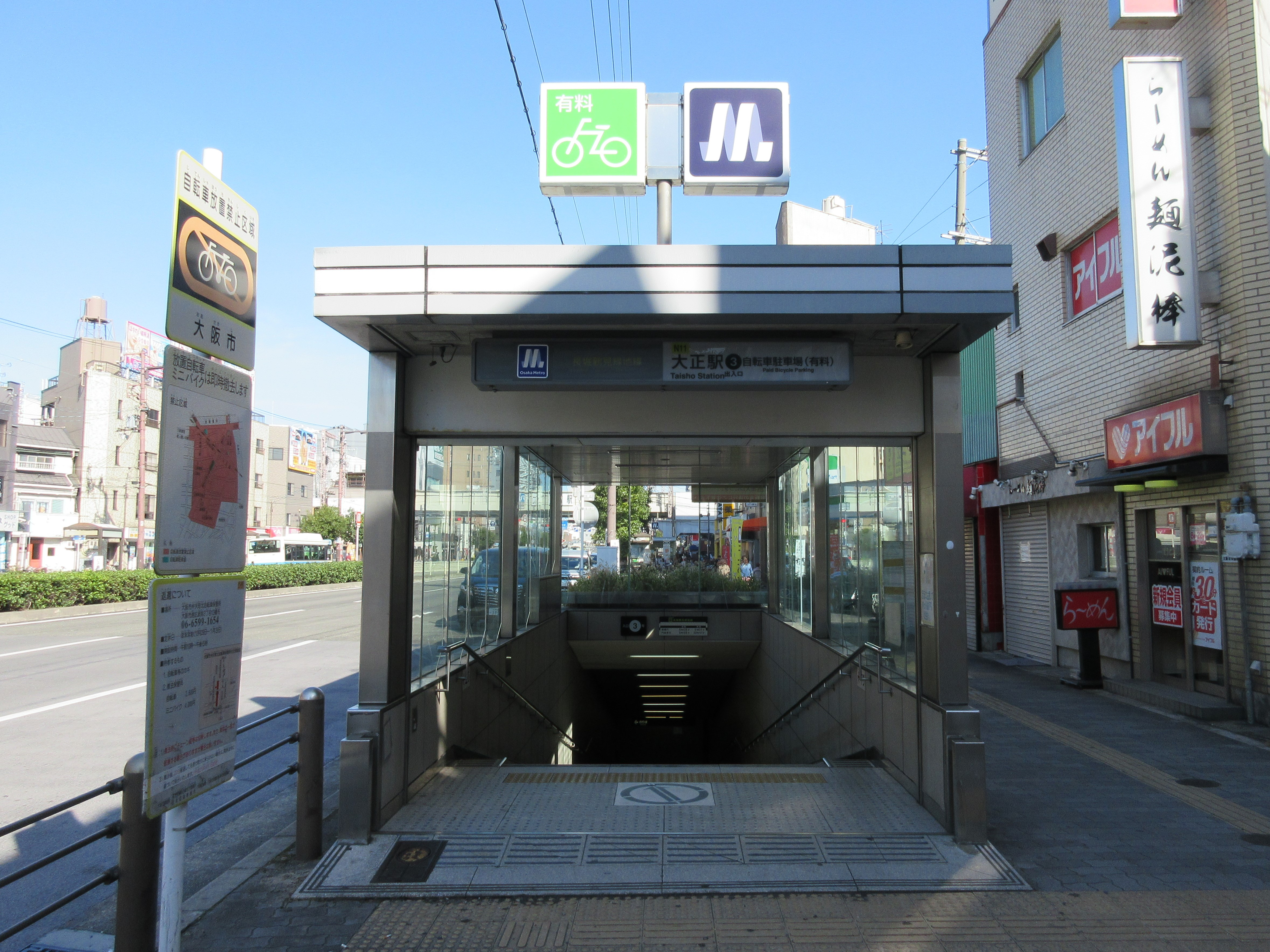 大阪市高速電気軌道（Osaka Metro）大正駅